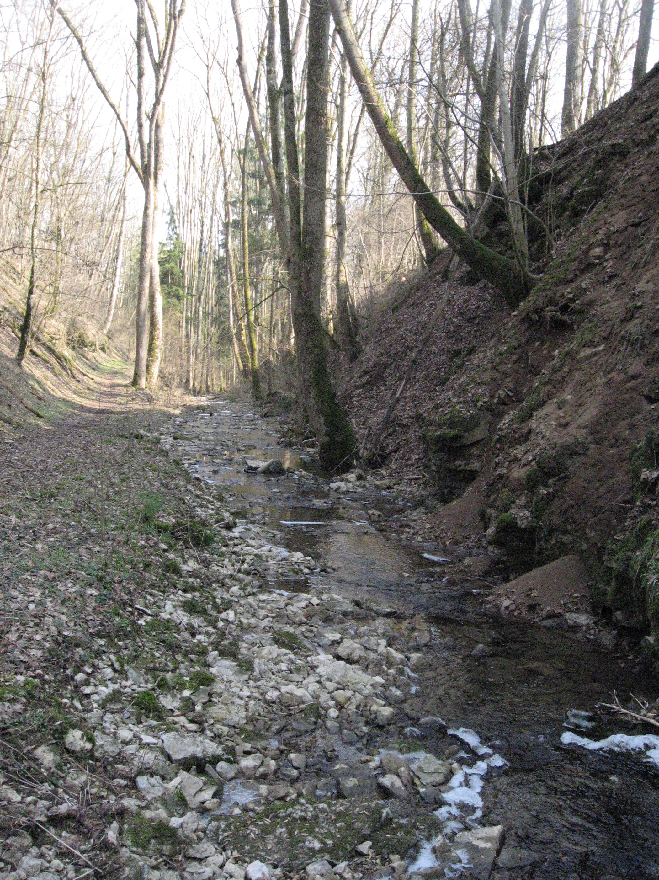 Blick talabwärts des Steinbachs in der Mitte seiner Klinge Steinbachs südöstlich des Vellberger Hörgershofes. Links des Baches der Wanderweg zum Taubenloch, etwas versetzt hinter der Steilwand rechts liegt die Grube des Obersontheim-Ummenhofener Steinbruchs im Oberen Muschelkalk Muschelkalk.